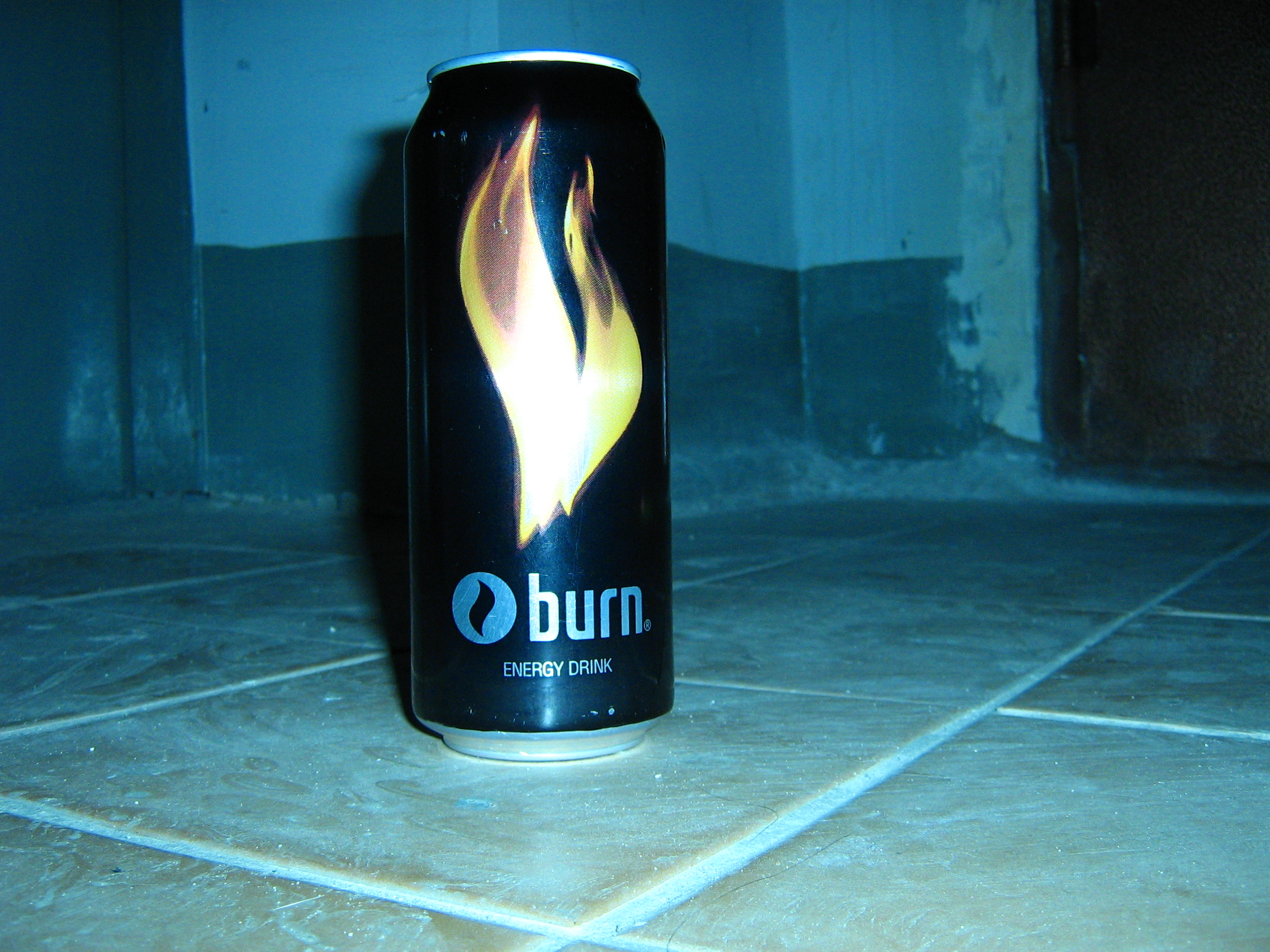 Энергетический напиток "Бёрн"